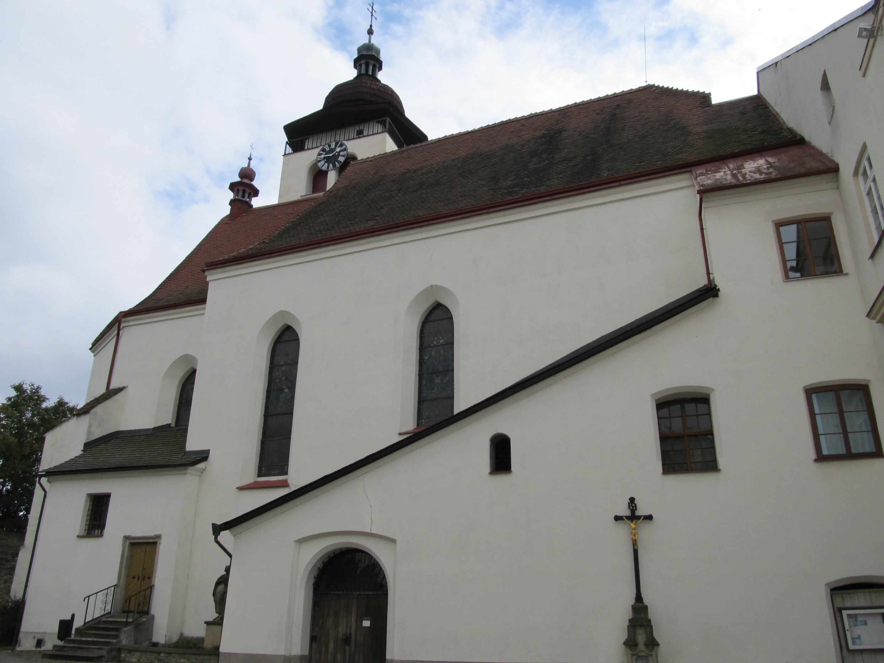 Kostel Nejsvětější Trojice (Nové Město nad Metují), Husovo nám., Nové Město nad Metují